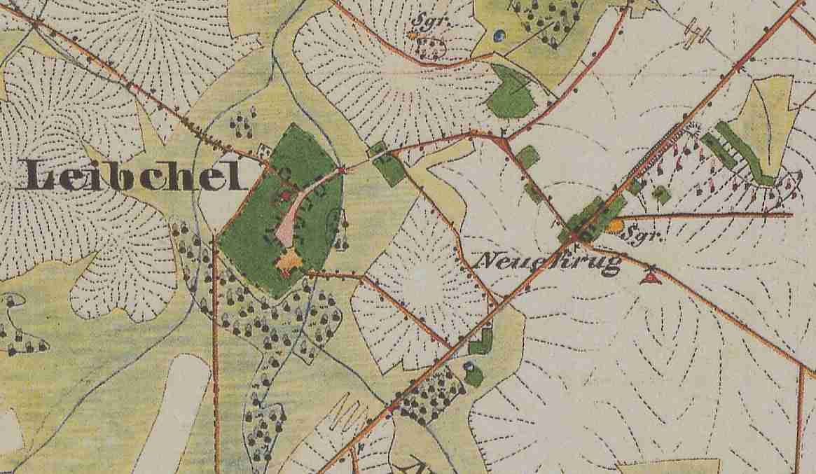 Leibchel, Ortsteil der Gemeinde Märkische Heide, Landkreis Dahme-Spreewald, Brandenburg, Deutschland, Ausschnitt aus dem Urmesstischblatt 3950 Groß Leuthen von 1846